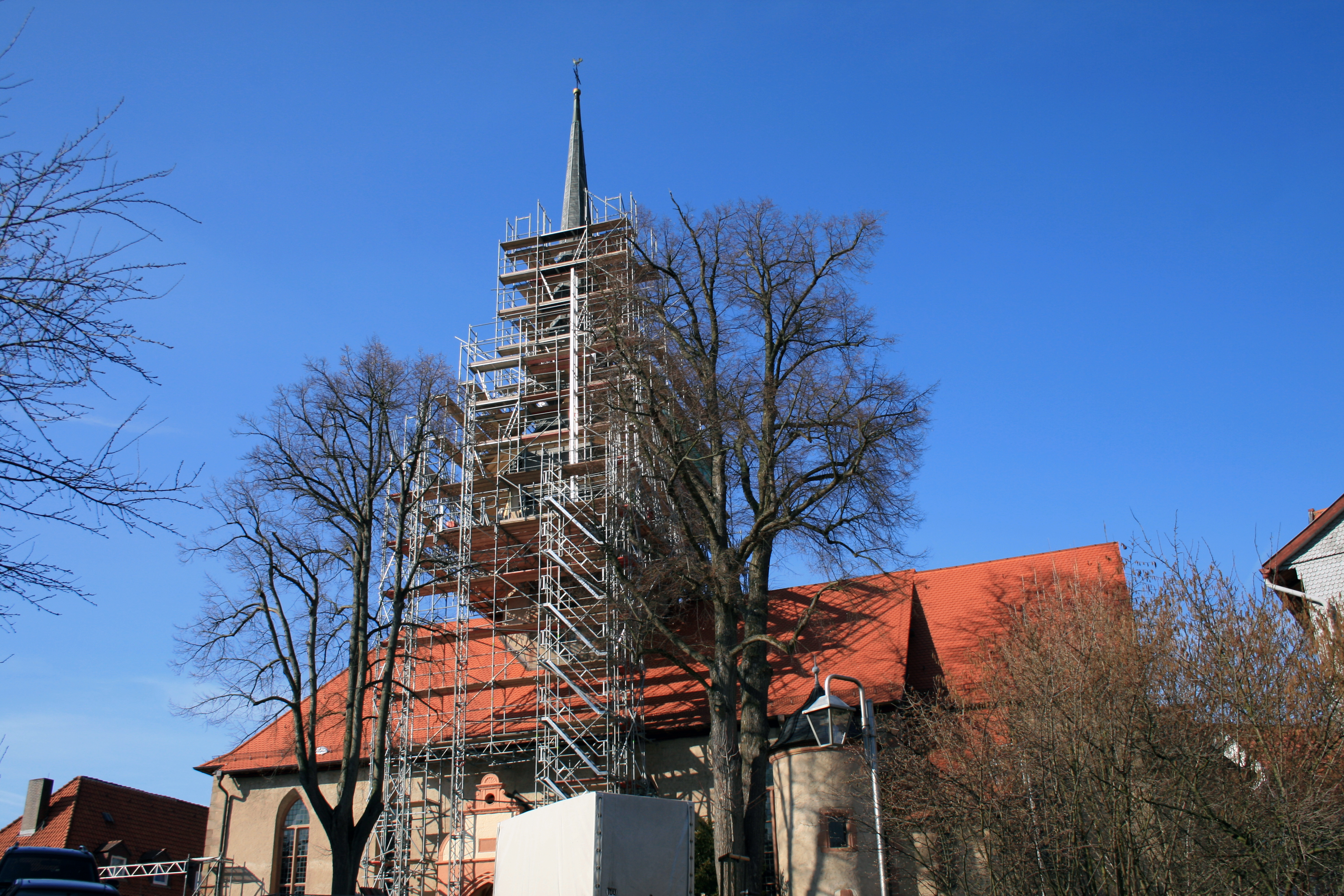 Stadtkirche Schlitz während der Turmsanierung